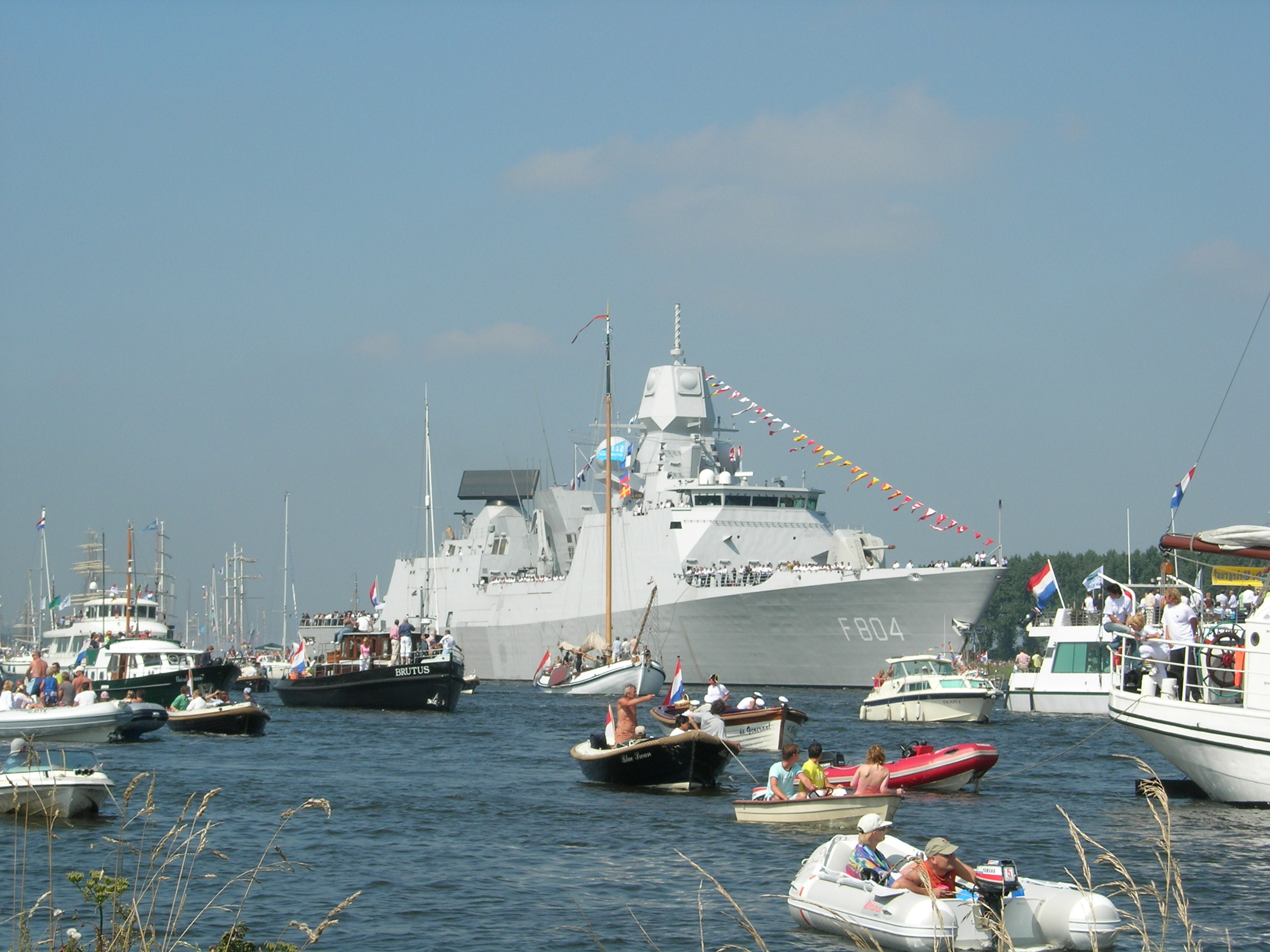 Hr. Ms. de Ruyter tijdens sail 2005